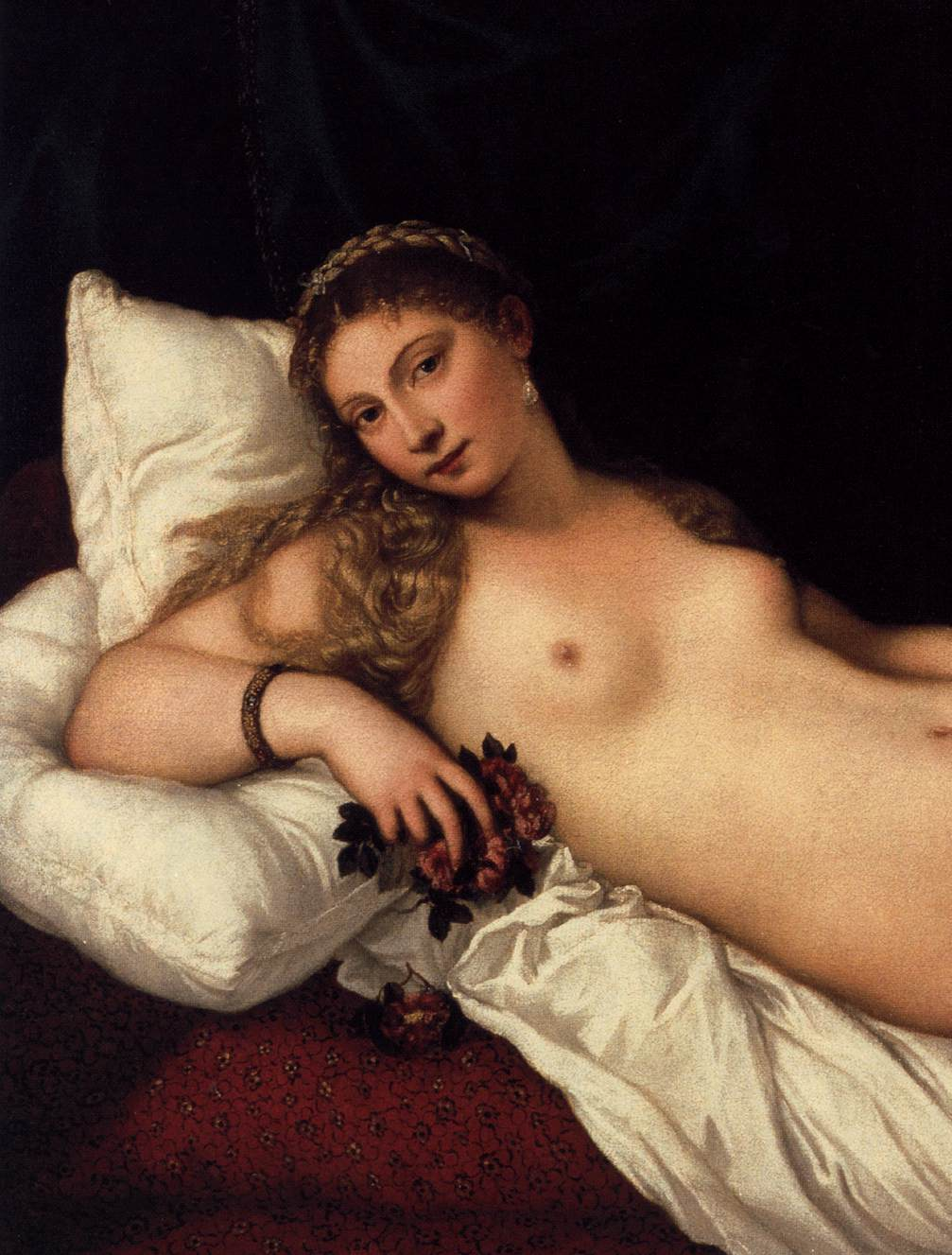 detail